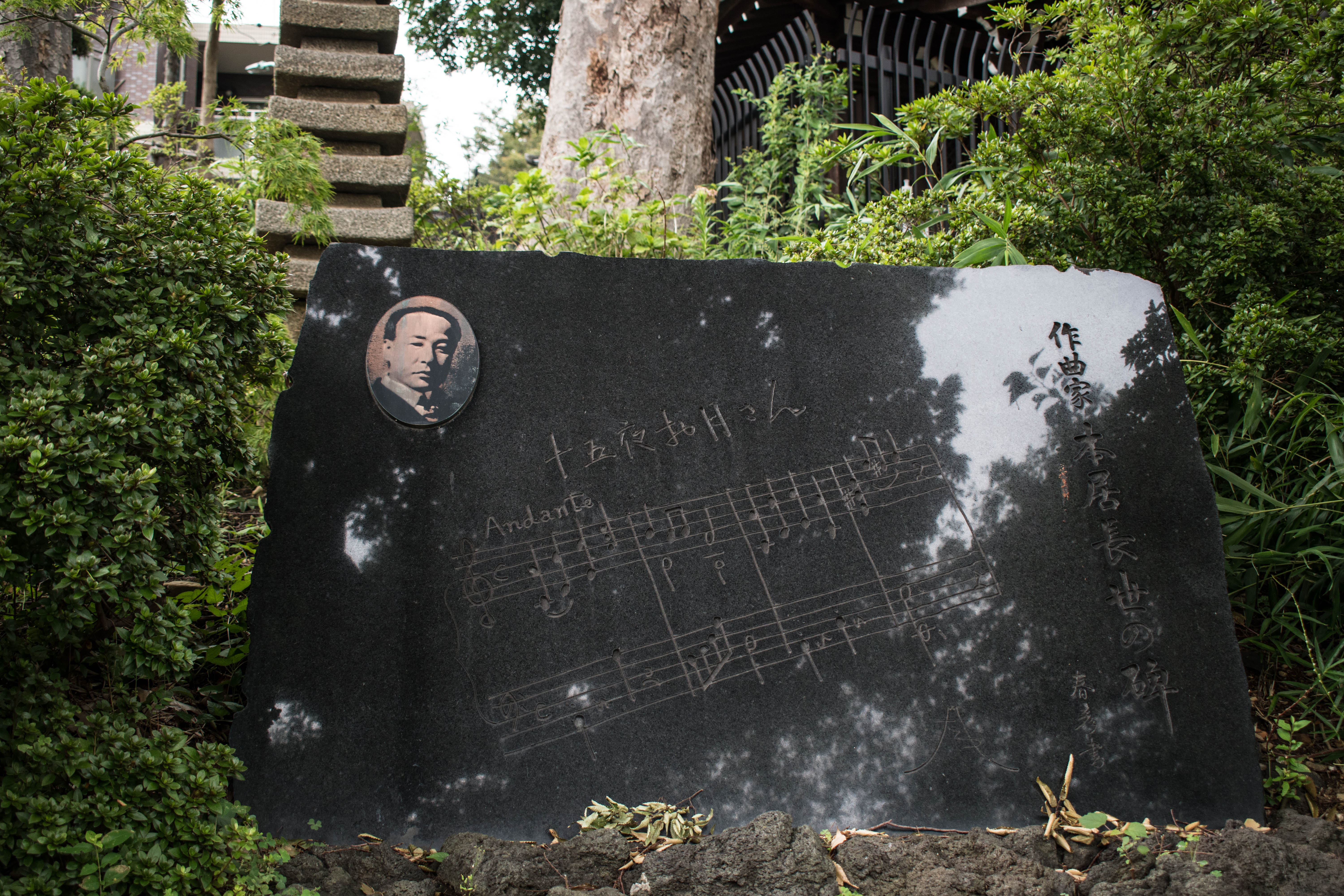 本居長世 記念碑。東京都目黒区 目黒不動尊龍泉寺境内。